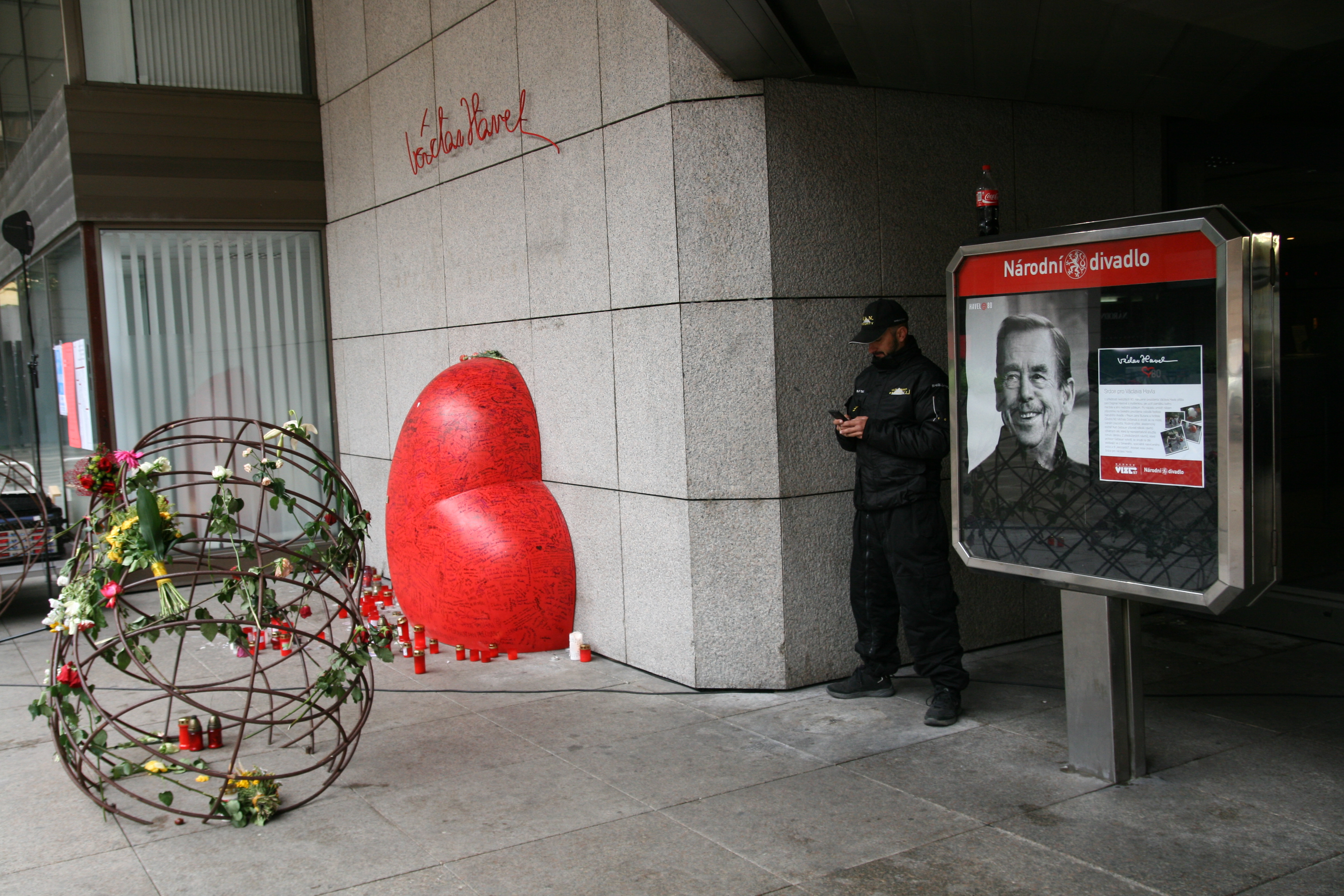 Nově pojmenované náměstí Václava Havla na piazzettě Národního divadla v Praze.